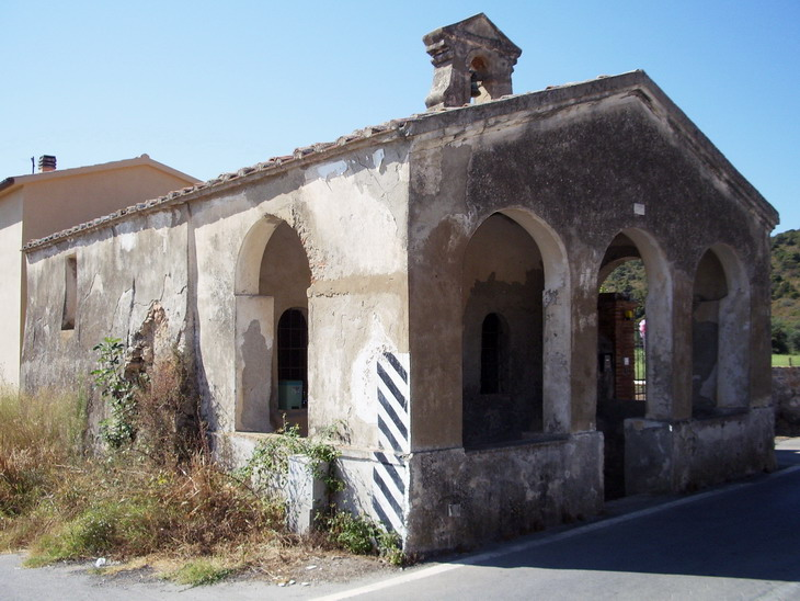 Facciata della chiesa della Madonna delle Grazie presso Talamone